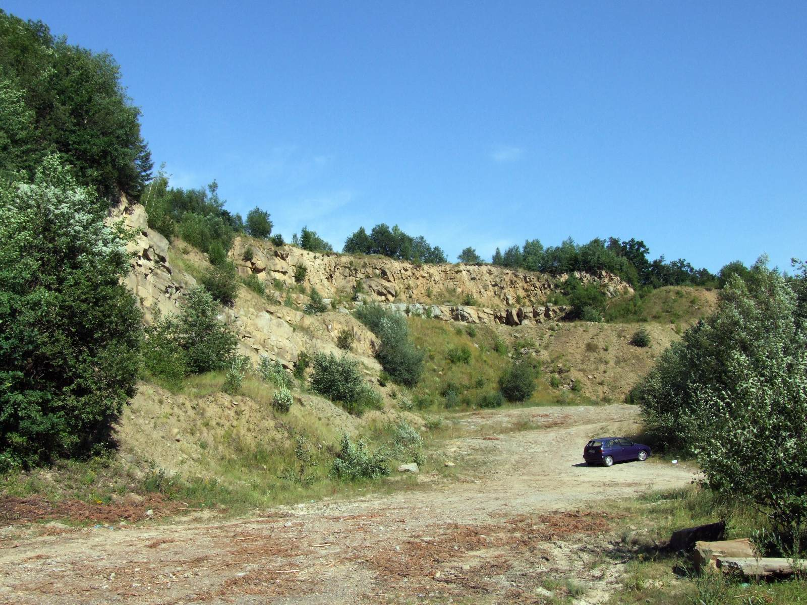 Nieczynny kamieniołom w Męcinie